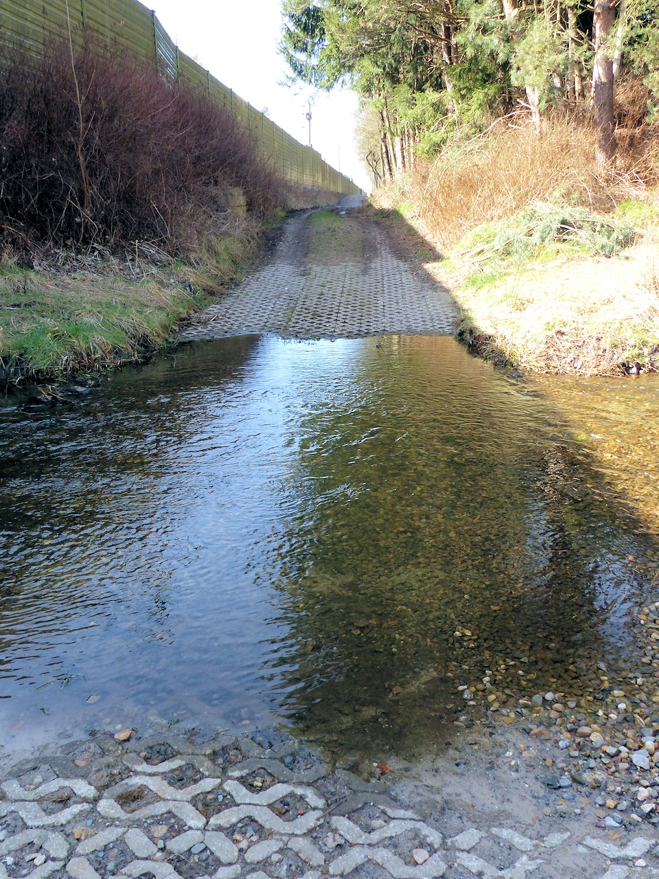 Furt durch die Alte Hehlenriede an der ICE-Bahnstrecke bei Winkel, Blickrichtung Westen.